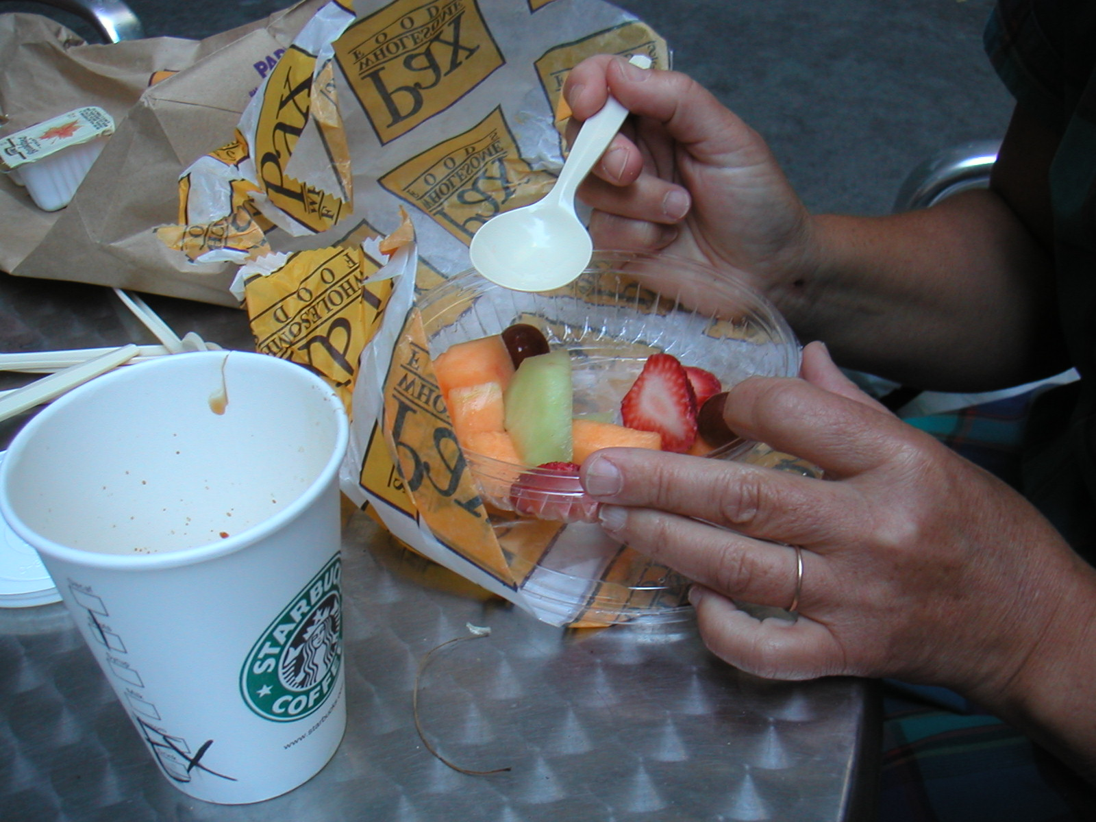 Frugtsalat og kaffe